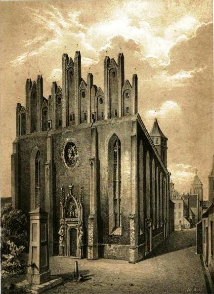 Gdańsk Główne Miasto, ul. Świętojańska 72 - kościół klasztorny dominikanów, obecnie rzymskokatolicki parafialny p.w. św. Mikołaja (Bazylika mniejsza), XIII, 2 poł. XIV, XV